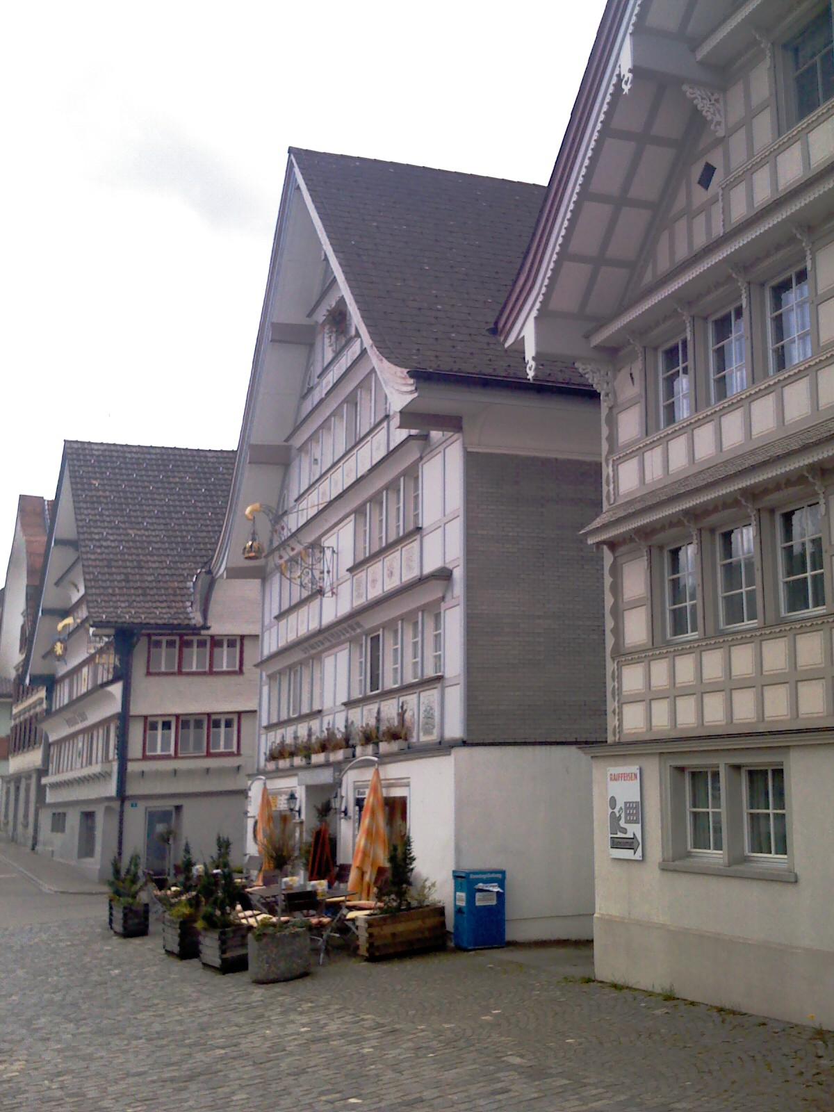 Hemberg, centre of the village, Toggenburg, Switzerland - Hemberg en Togenburgo, vilaĝcentro, Svislando